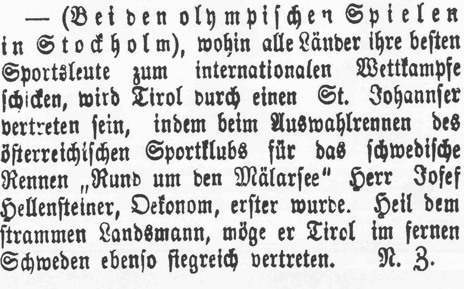 Der Bote für Tirol berichtete 1912 von der Teilnahme Josef Hellensteiners bei den V. Olympischen Sommerspielen in Stockholm